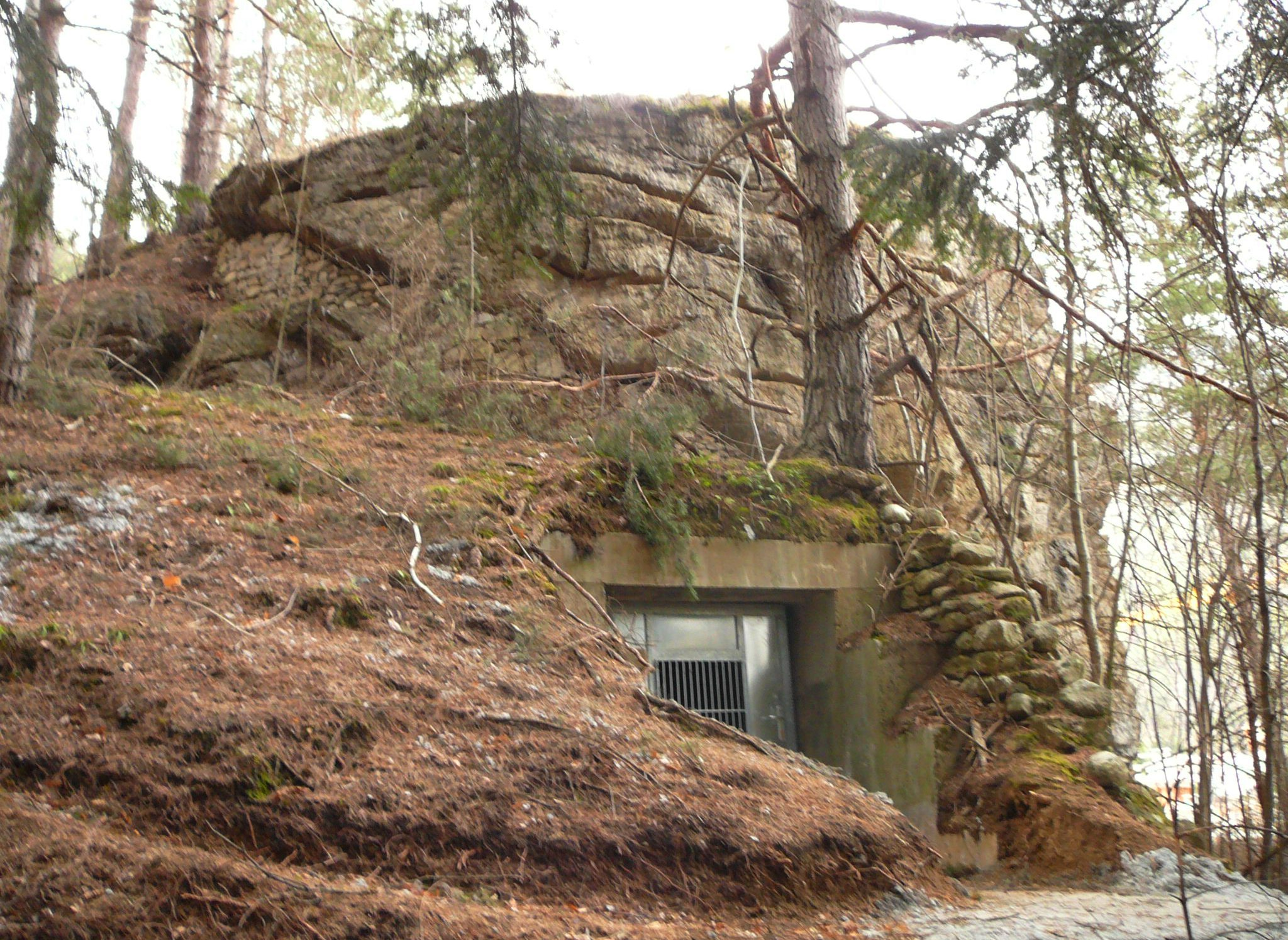 Opera 17 sciaves